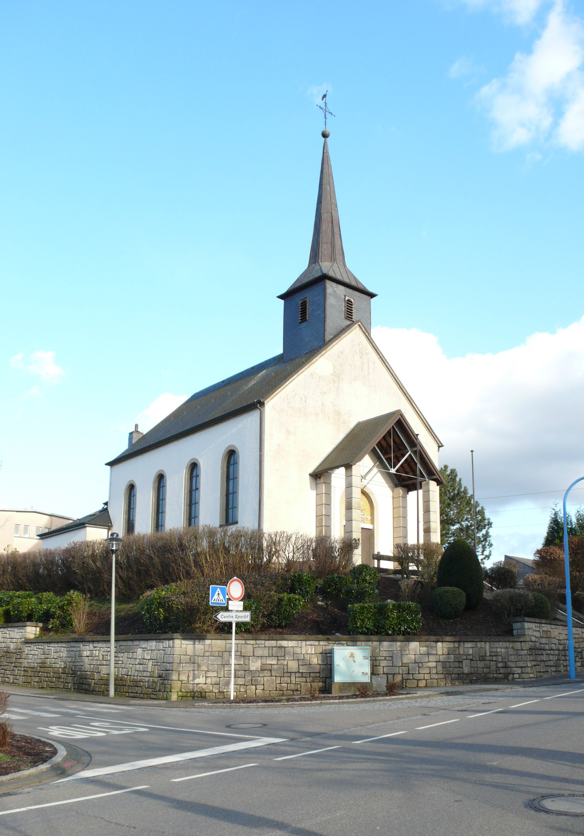 Kapell vu Steebrécken .